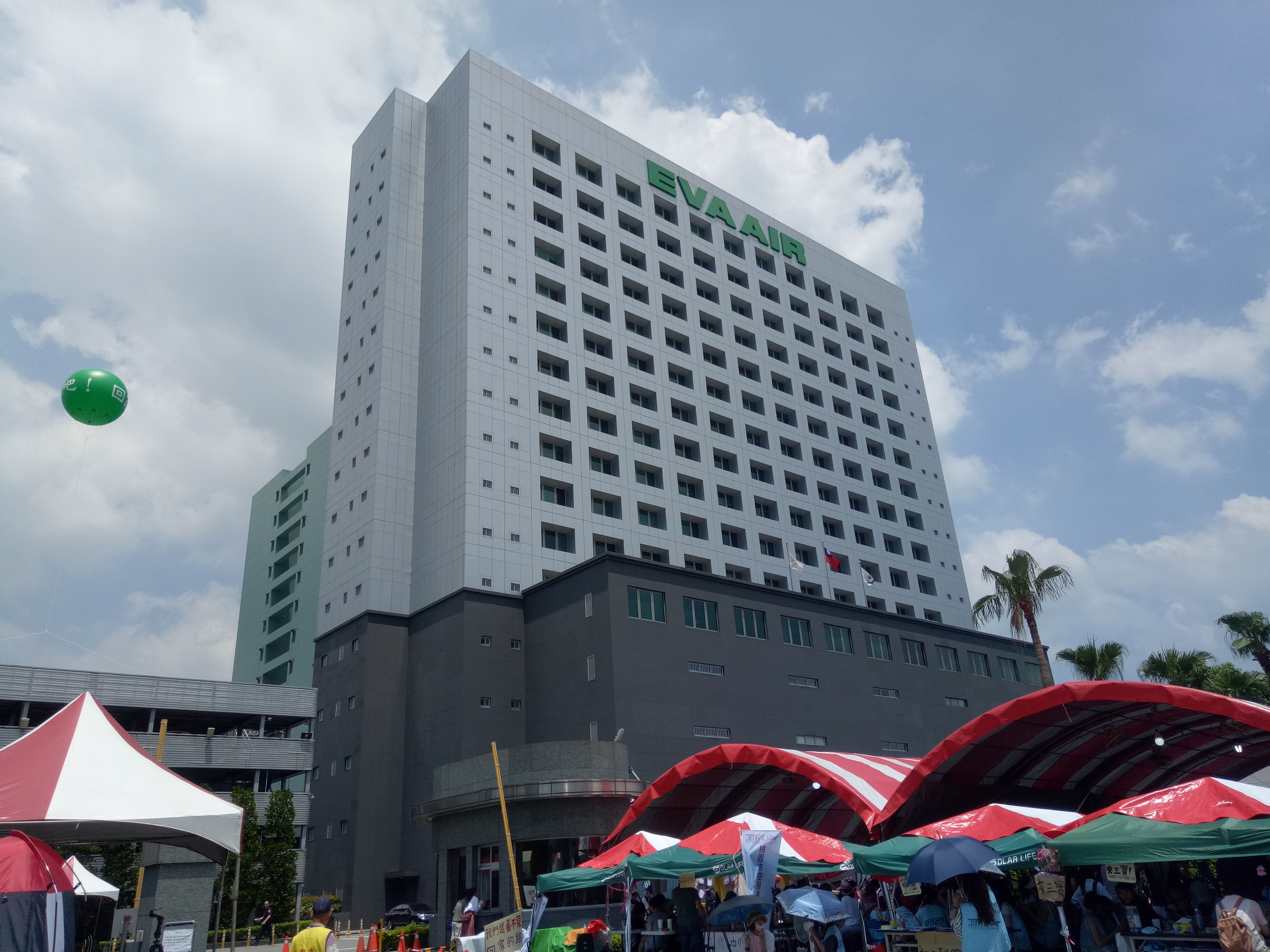 2019年長榮航空空服員罷工現場，長榮航運大樓。